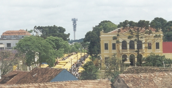 Curitiba - Feira do Largo da Ordem - Vista de prédio próximo